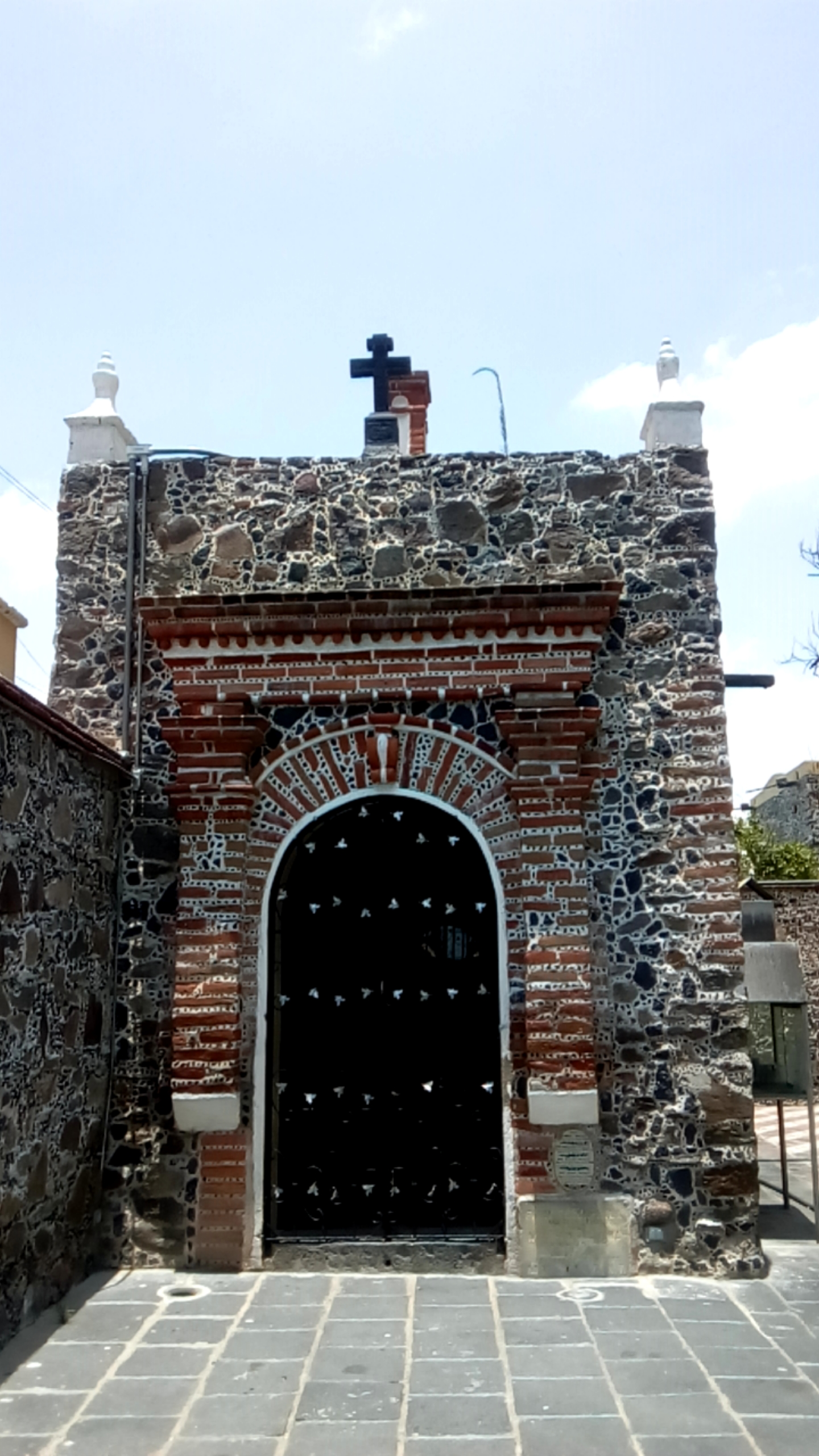 Capilla adjunta a la iglesia de Santa María Tonantzintla, en Puebla, México